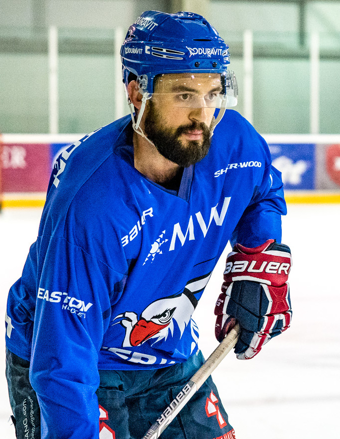 adler-00316